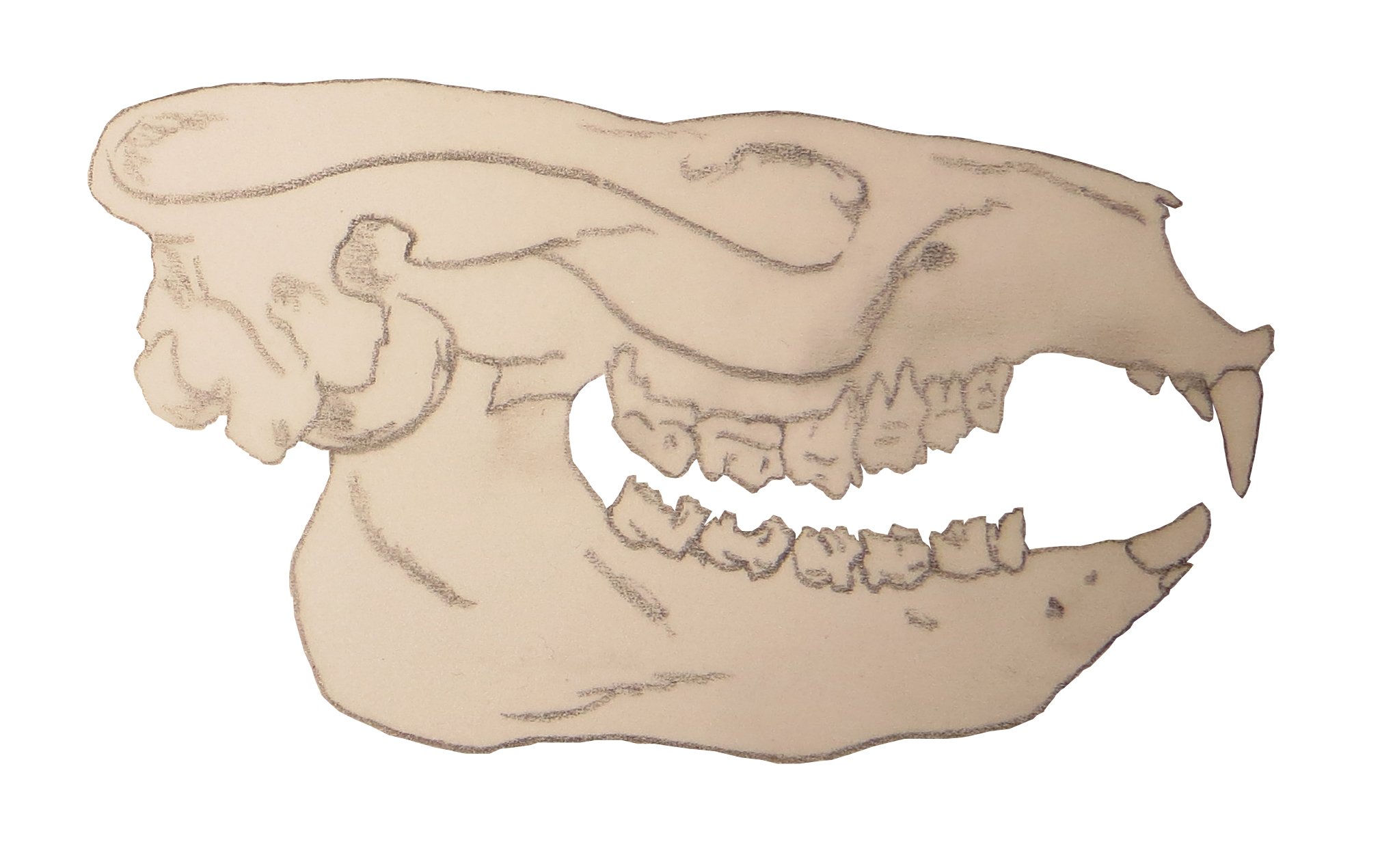 Skull of Notostylops